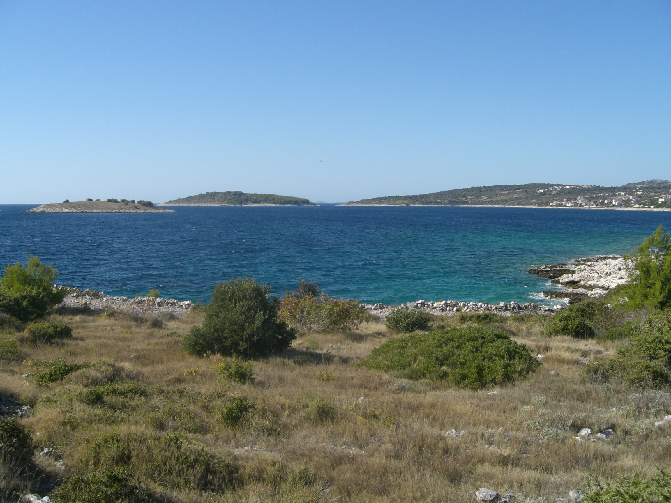 islands of Lukvenjak and Jaz, village of Zečevo Rogozničko